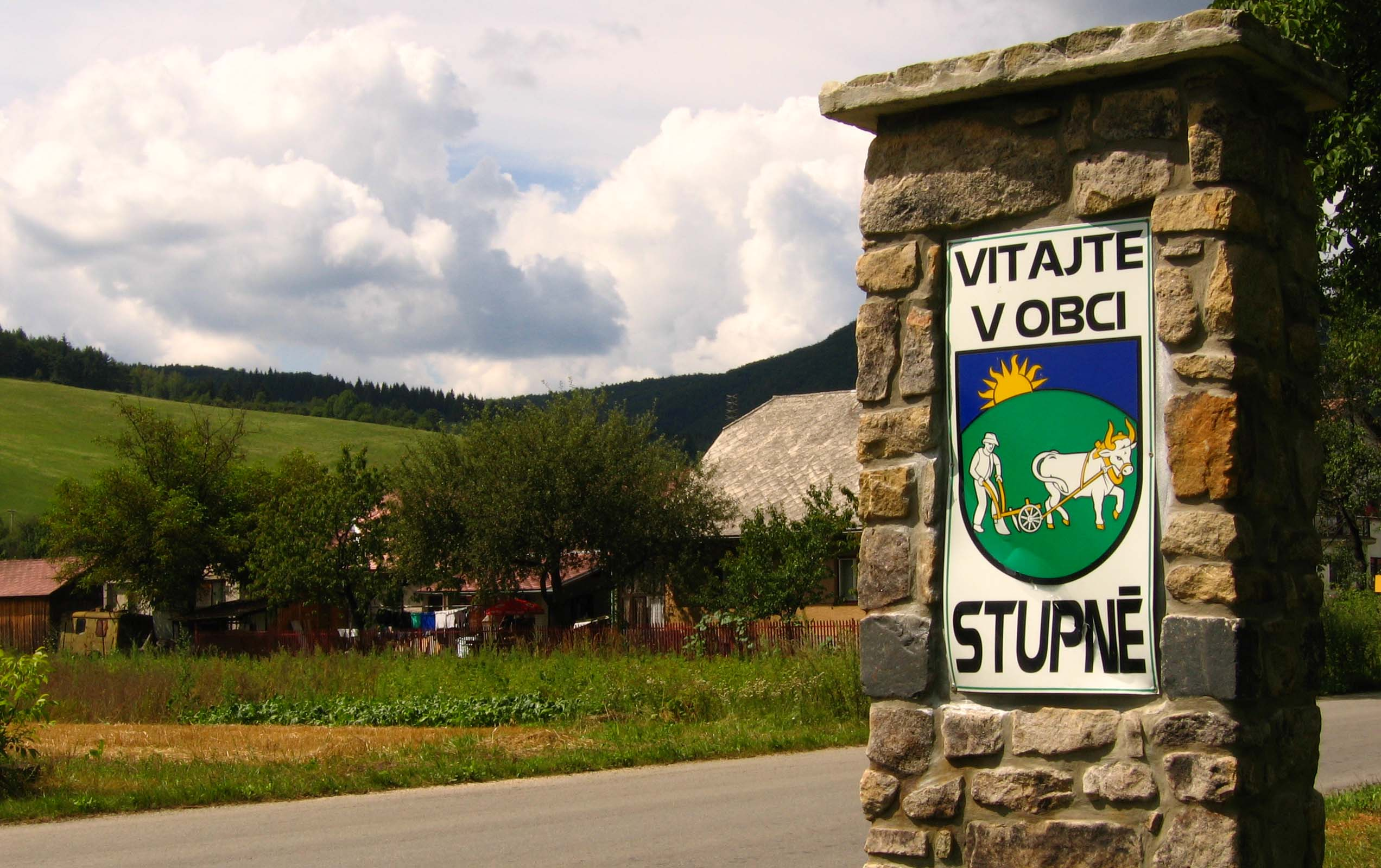 Stupné